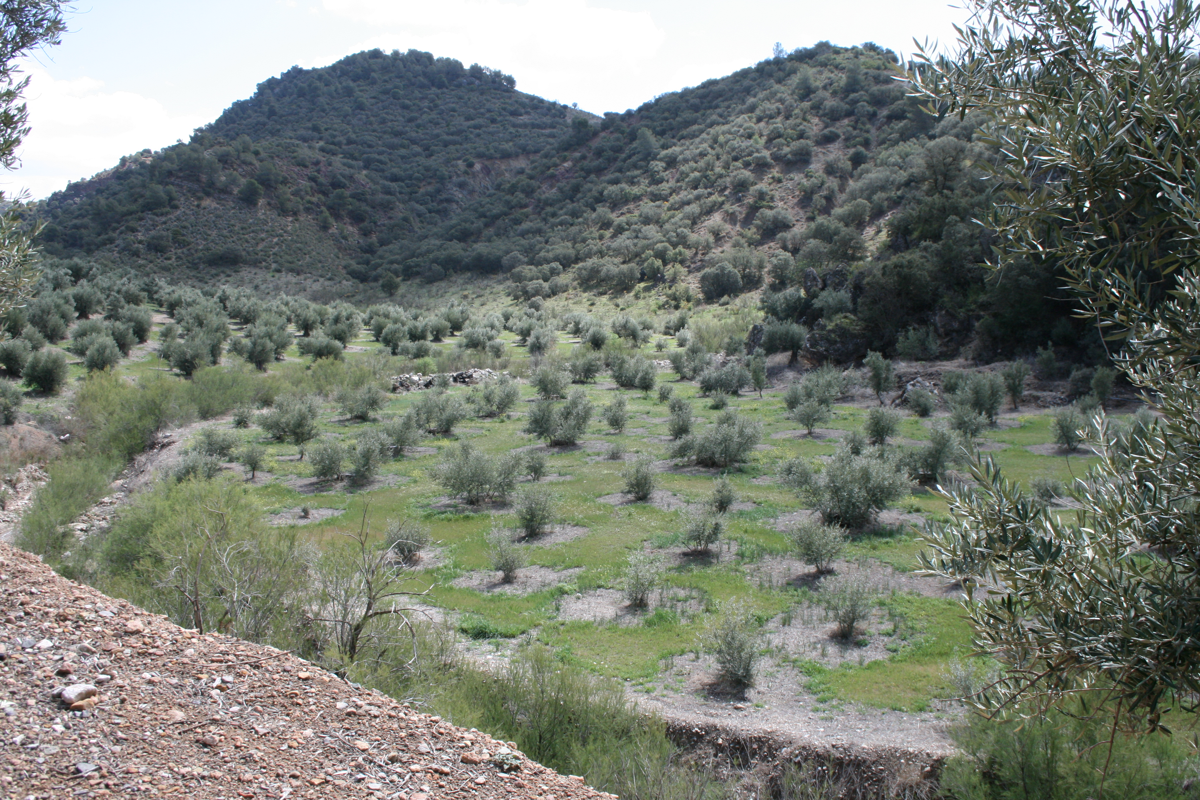 Olivares en Arbuniel (Jaen).